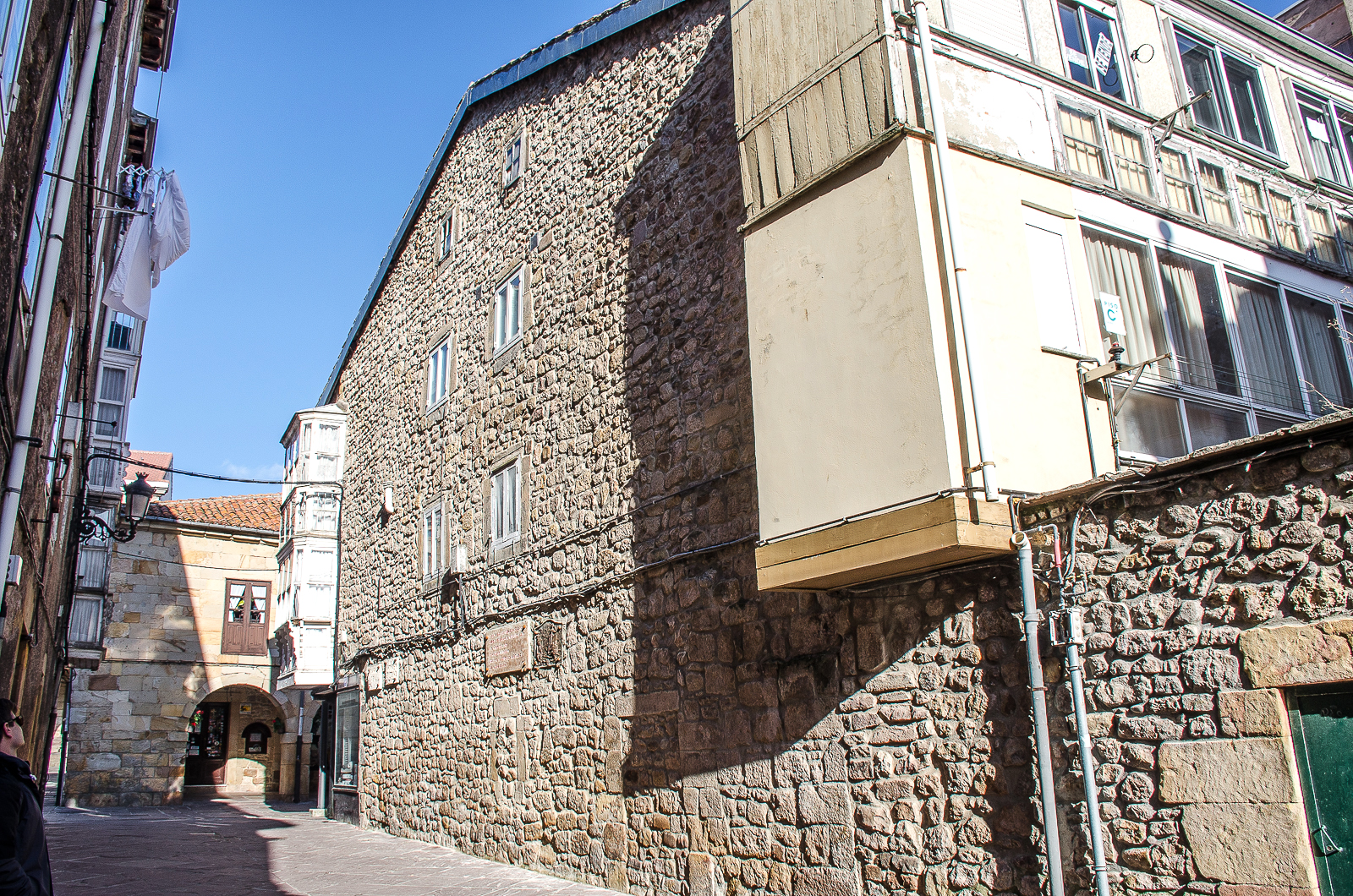 Casa natal de Juan Francisco Güemes y Horcasitas. Reinosa (Cantabria - España)